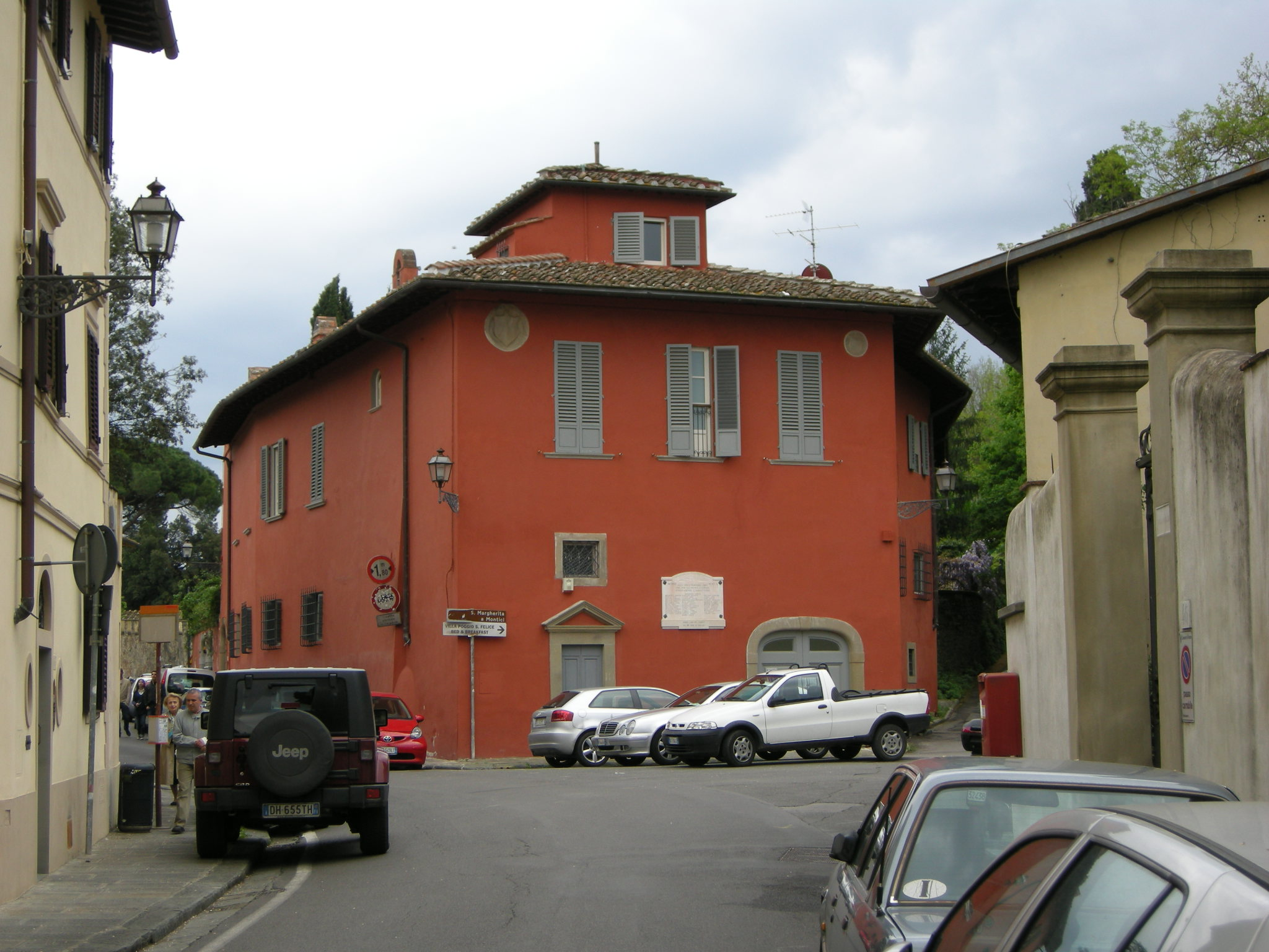 Villa le corti